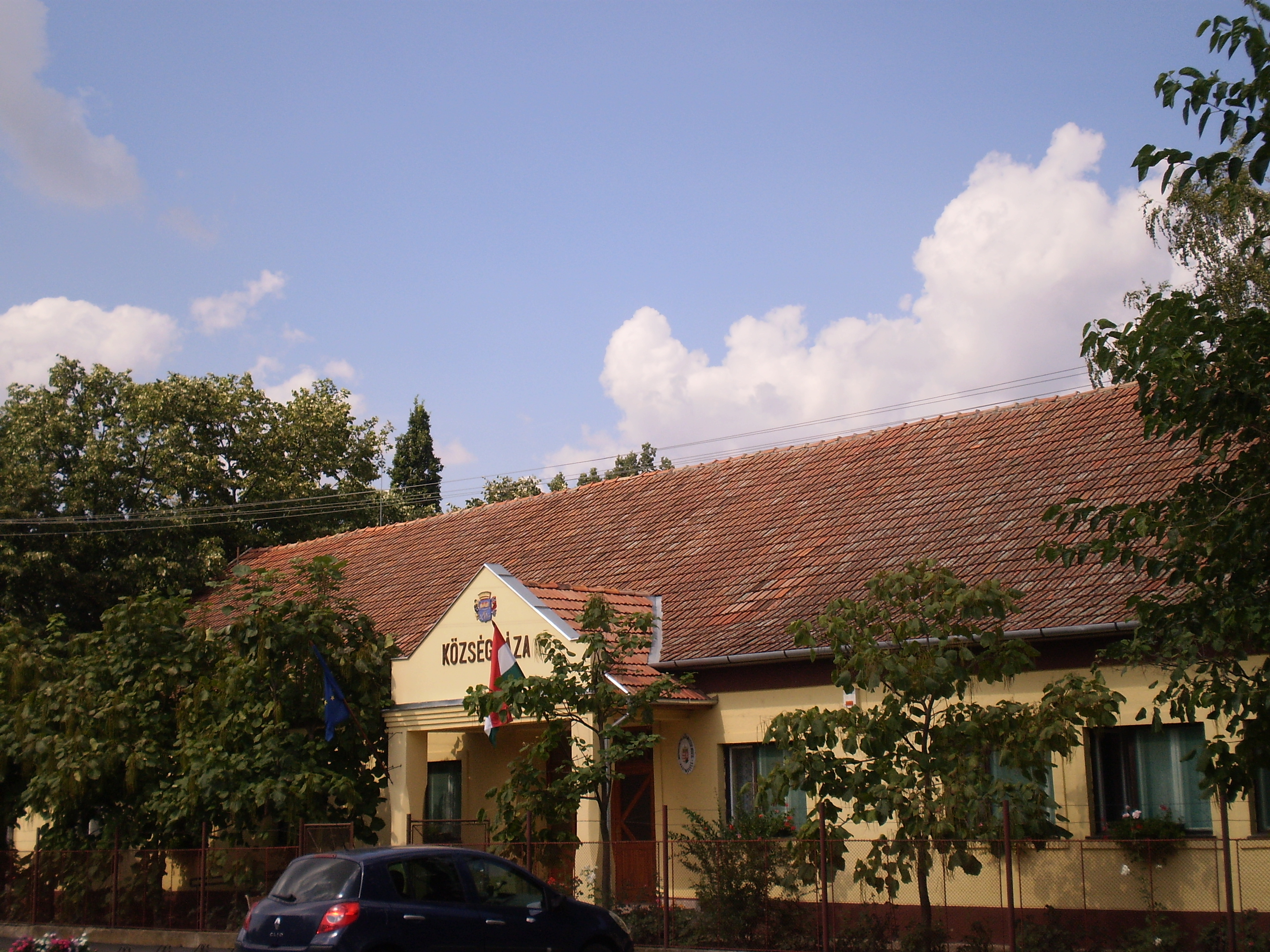 A nagymágocsi Községháza Nagymágocson, Magyarország